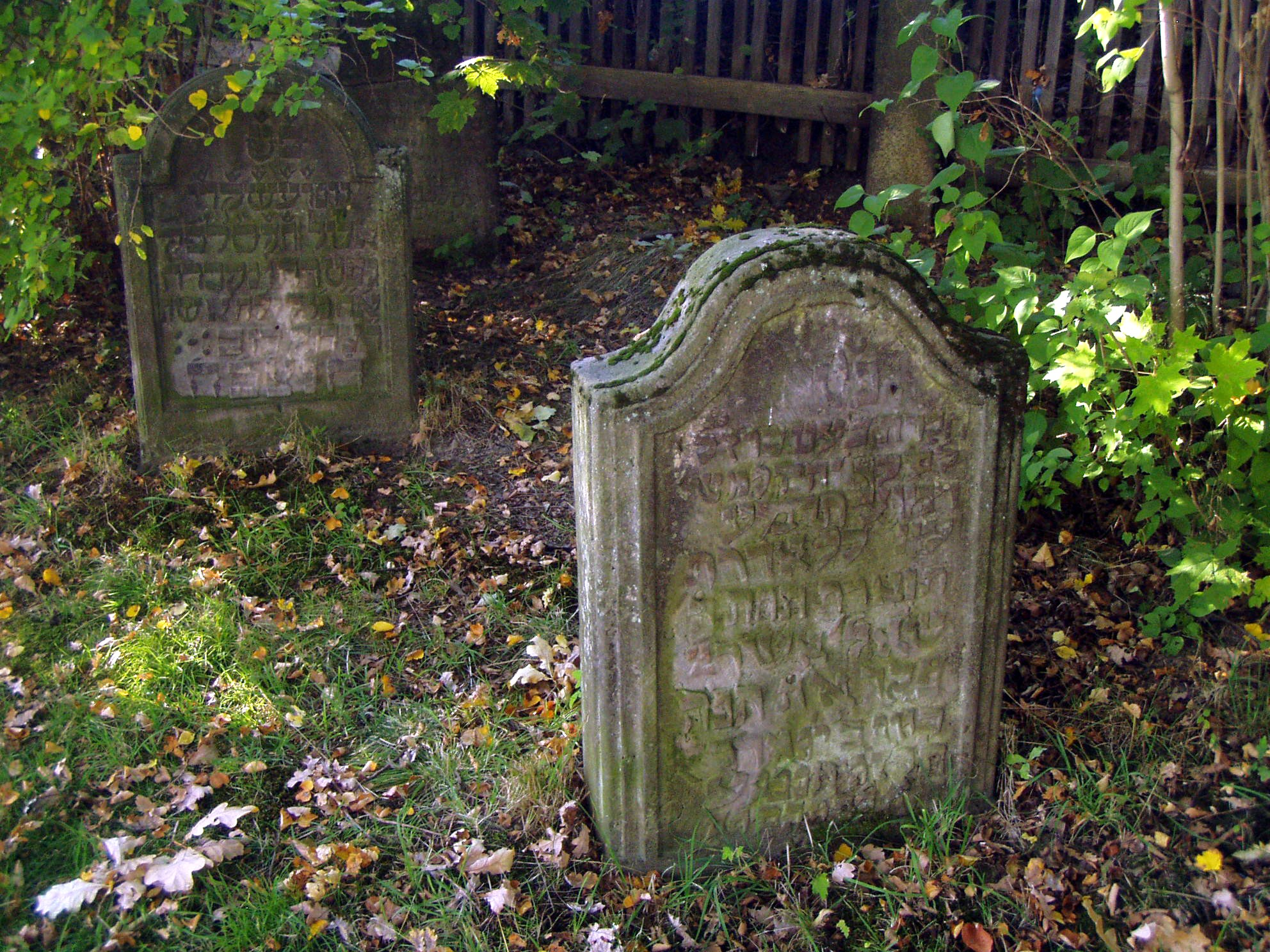 Tři židovské náhrobky v zahradě u Podještědského muzea v Českém Dubu přenesené z místního zničeného židovského hřbitova